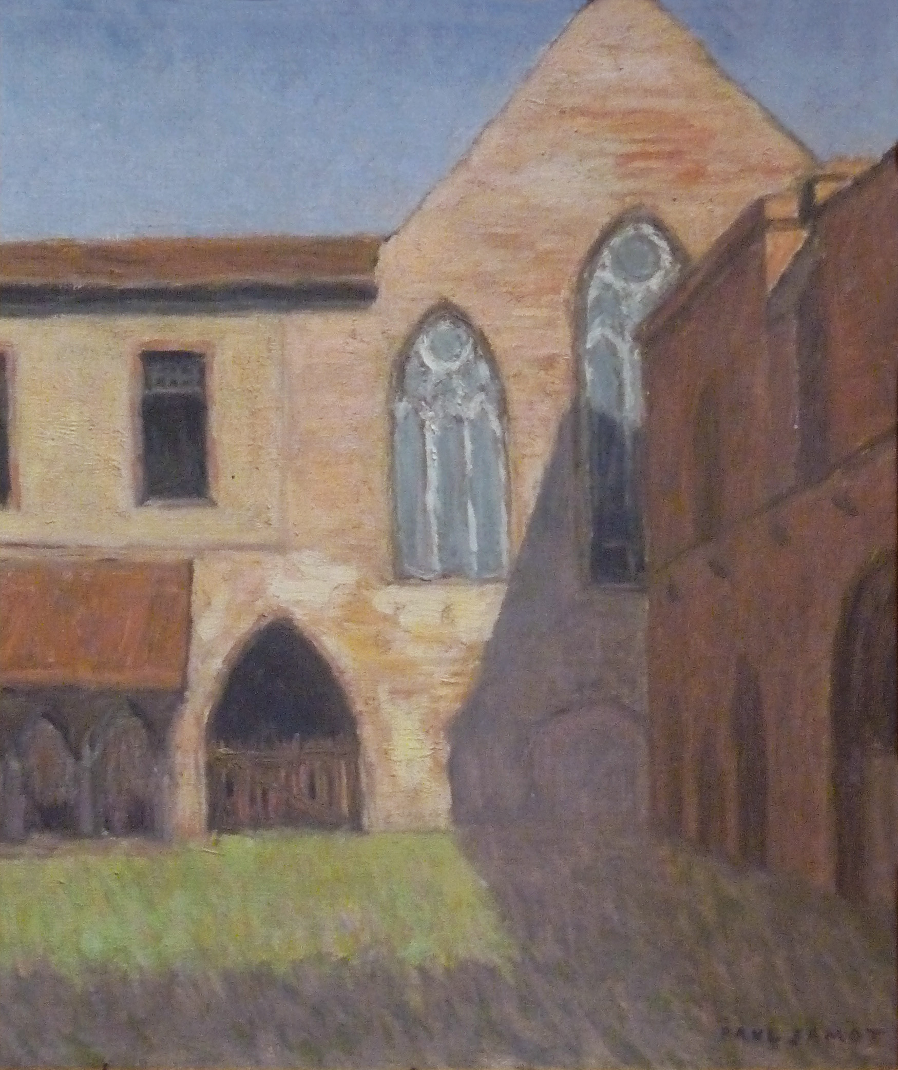 Cloître des Jacobins à Toulouselabel QS:Lfr,"Cloître des Jacobins à Toulouse"